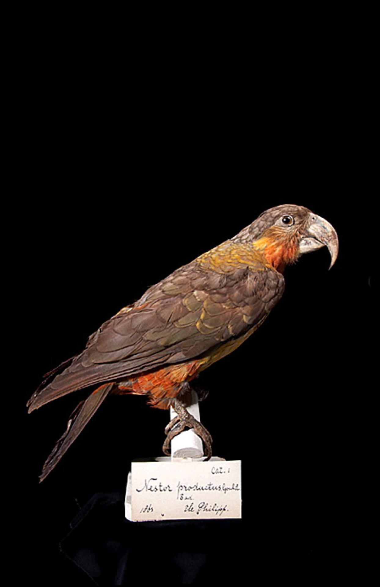 Nestor productus